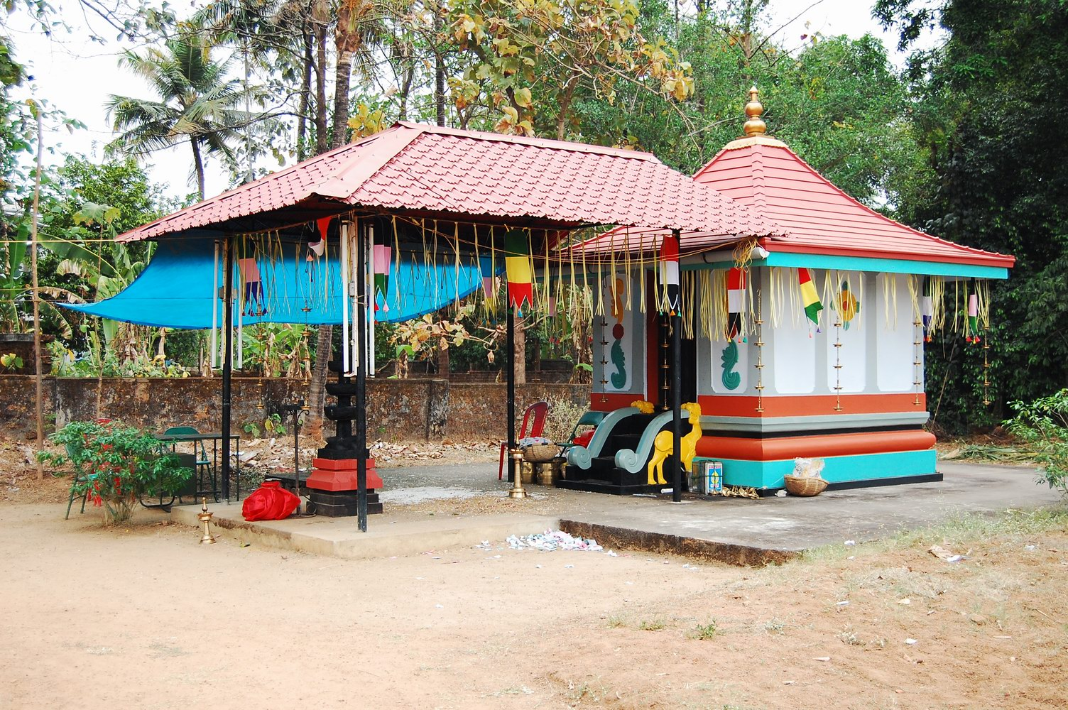 പാറപ്പുറത്തു ഭഗവതി- കണ്ണമ്പുഴ ഭഗവതി ക്ഷേത്രത്തിലെ ഉപദേവത